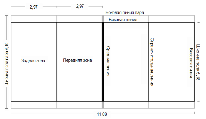 Разметка площадки для игры в ролибол